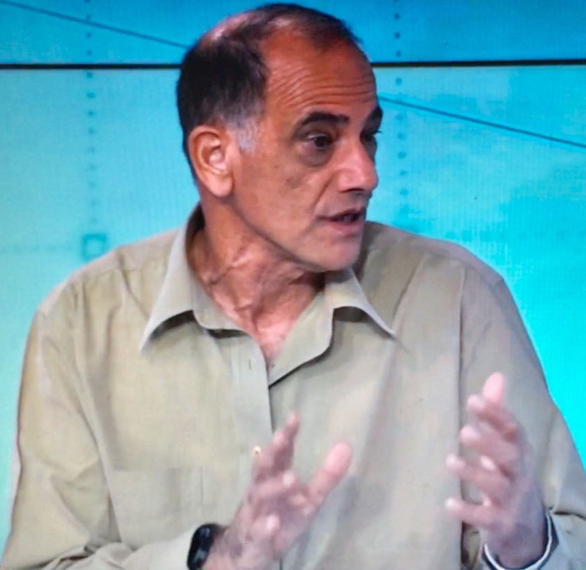 דר יעקב בן-שאול בעת ראיון באולפן אמצעי תקשורת.